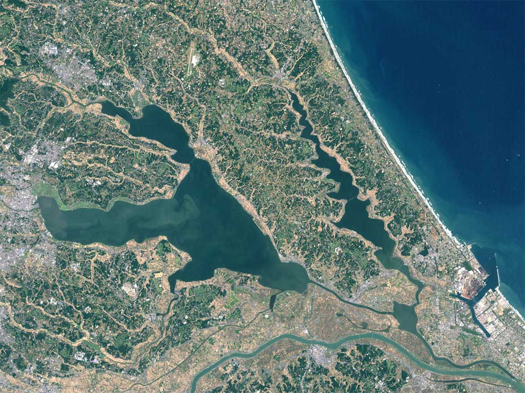 霞ヶ浦ランドサット画像